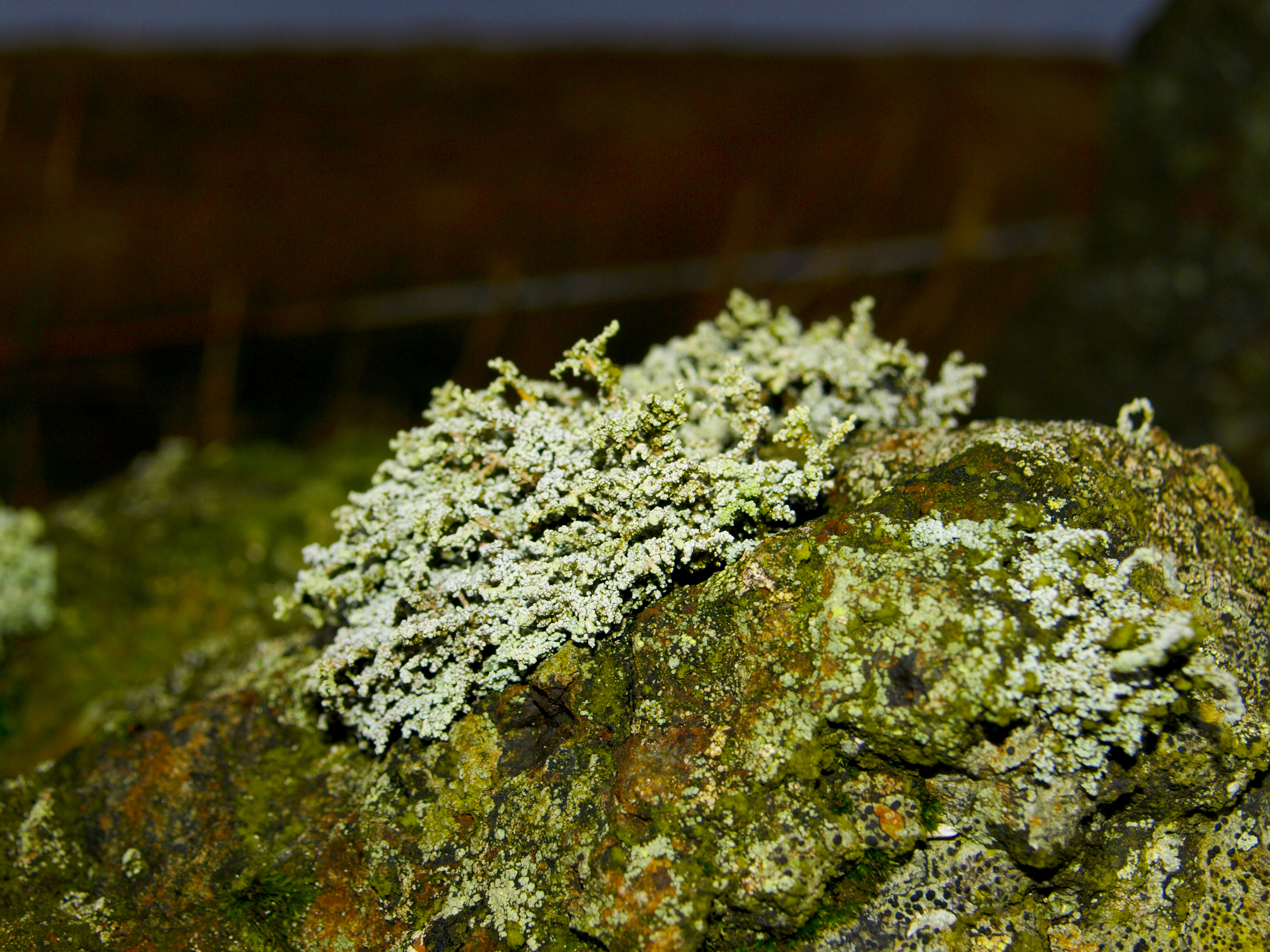 Lichen in Scotland